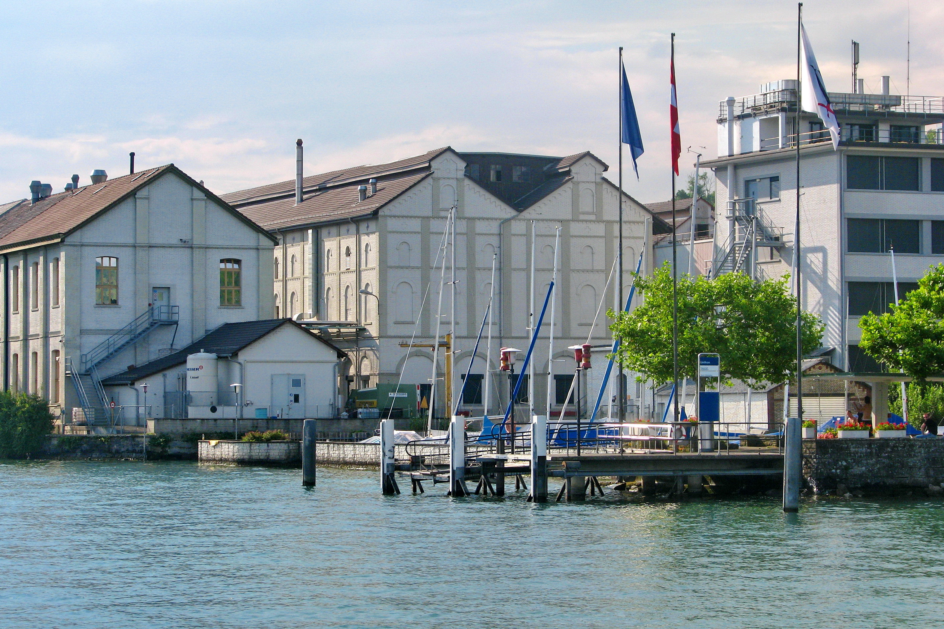 Chemische Fabrik in Uetikon am See (Switzerland) as seen from Zürichsee-Schifffahrtsgesellschaft (ZSG) paddle steamship Stadt Zürich